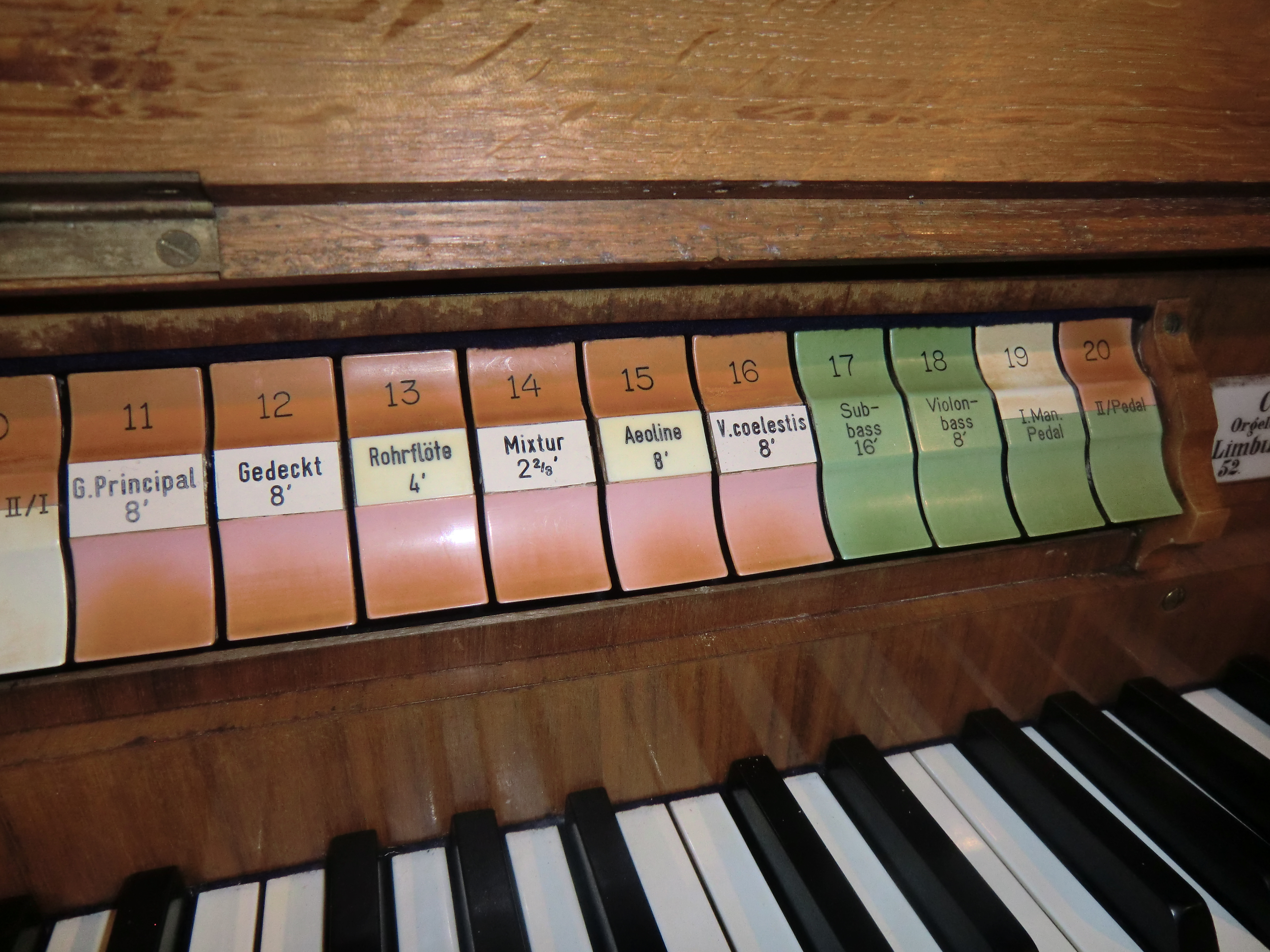 Orgelbauer Carl Horn - Orgel Pfaffenwiesbach: Registerzüge für das II. Man. und das Pedal (aufgeklebte Plättchen nicht original)